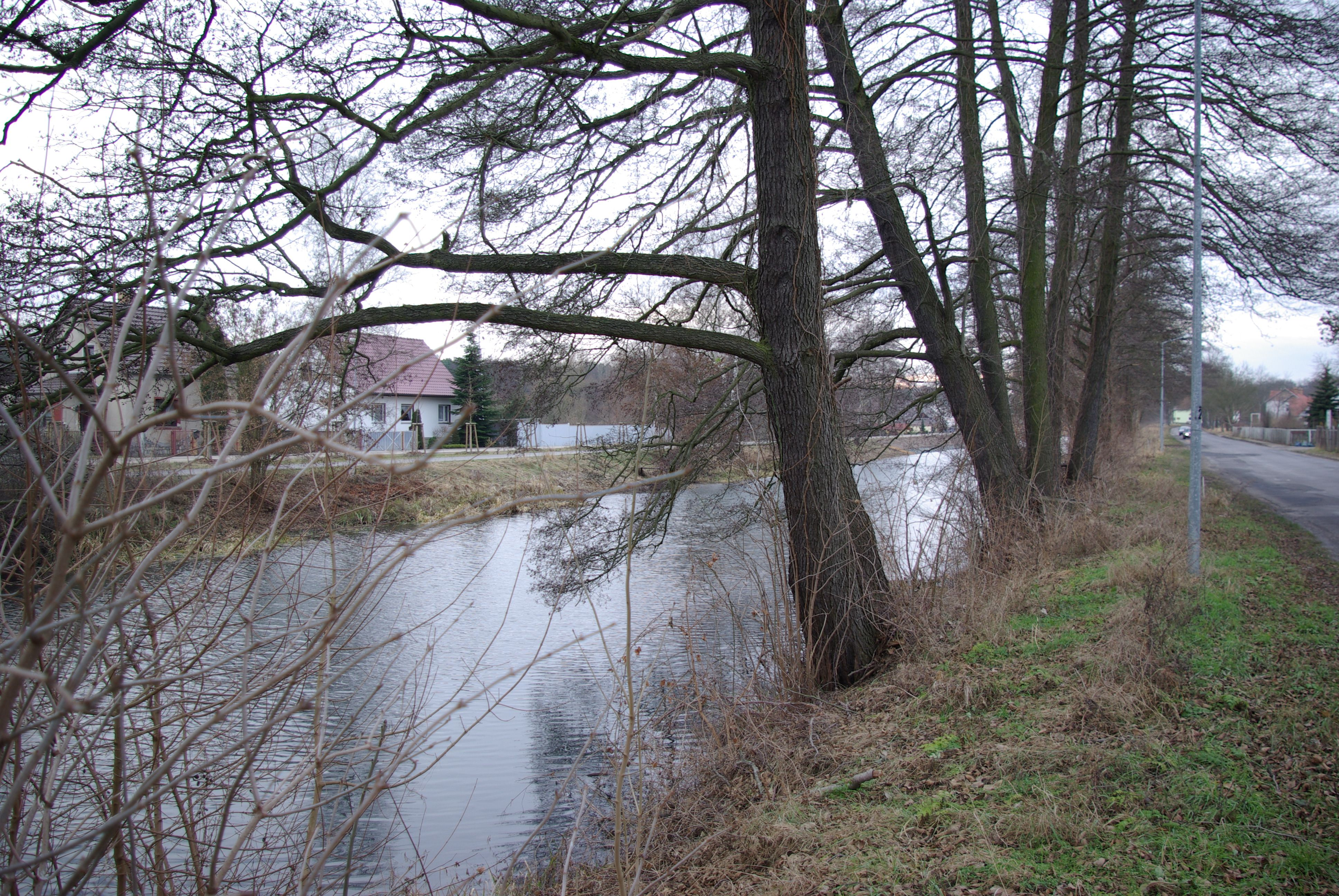 Der Friedrich-Wilhelm-Kanal bei Brieskow-Finkenheerd (Landkreis Oder-Spree, Brandenburg)